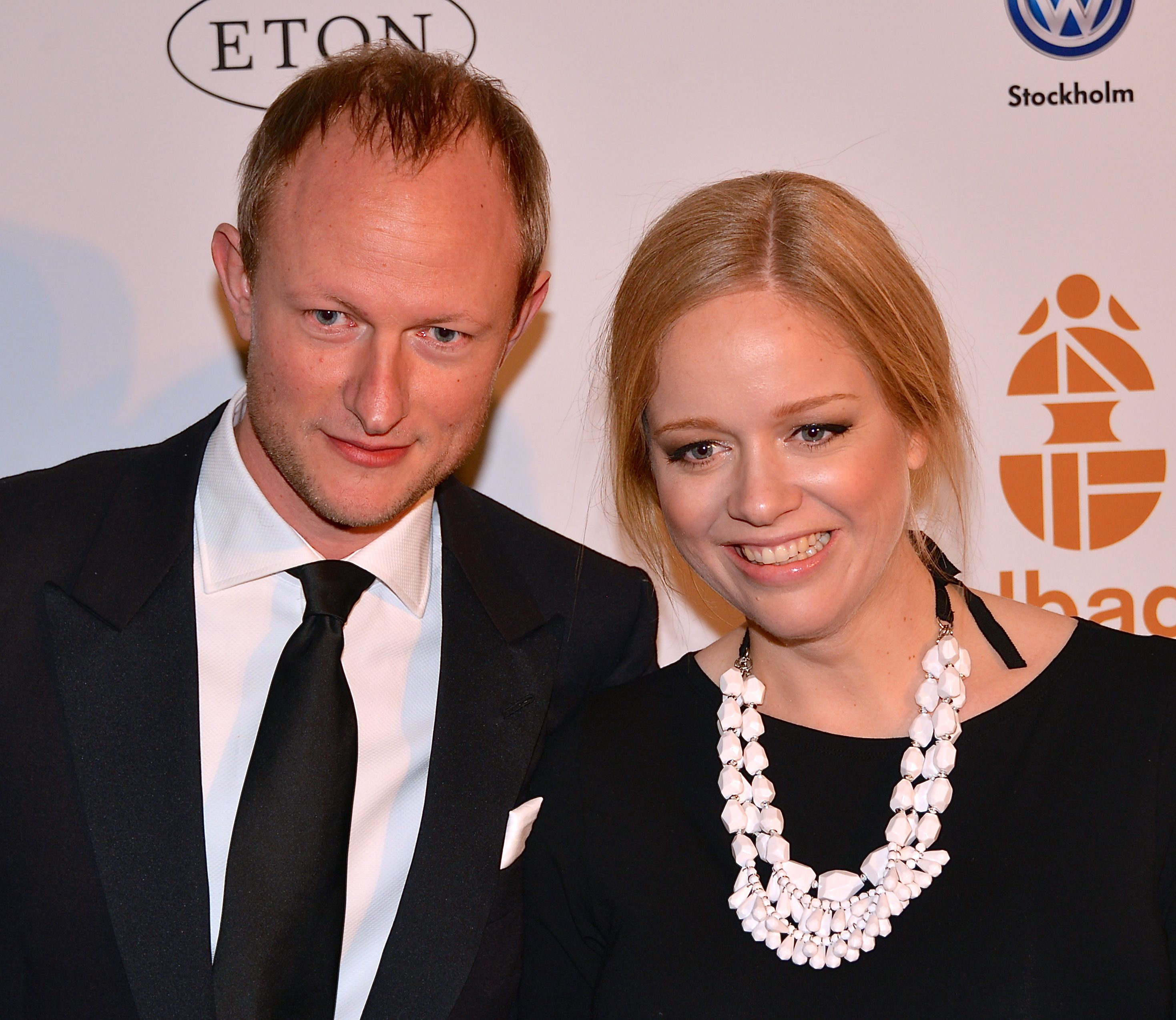 Johan Kleberg & Ebba von Sydow på på Guldbaggegalan 2013 den 21 januari 2013.